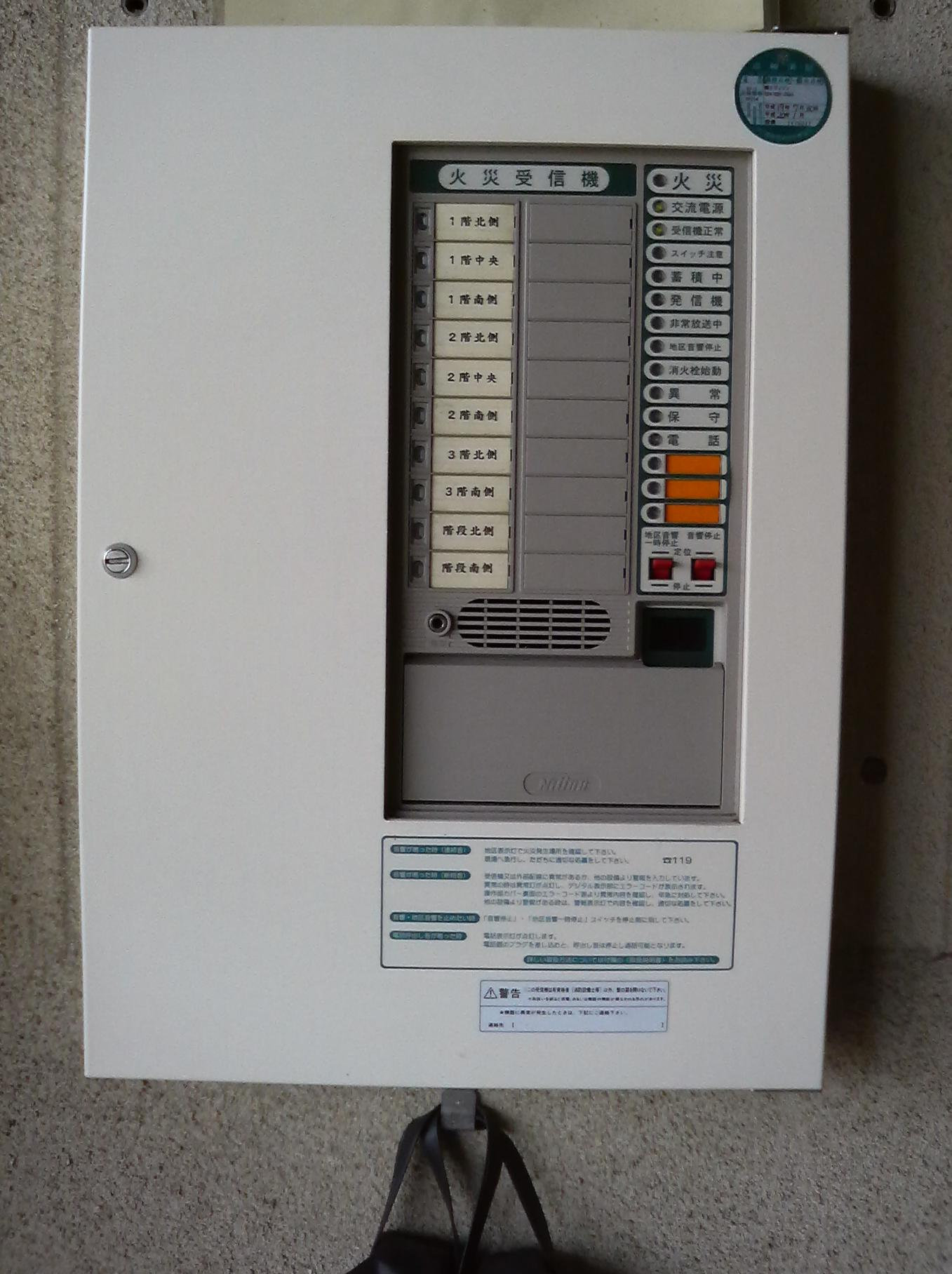 ニッタン製 P型1級火災受信機